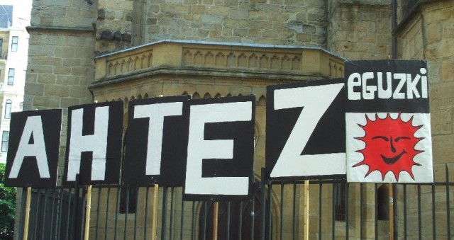 AHT ez afixa Donostiako estropada-egunean